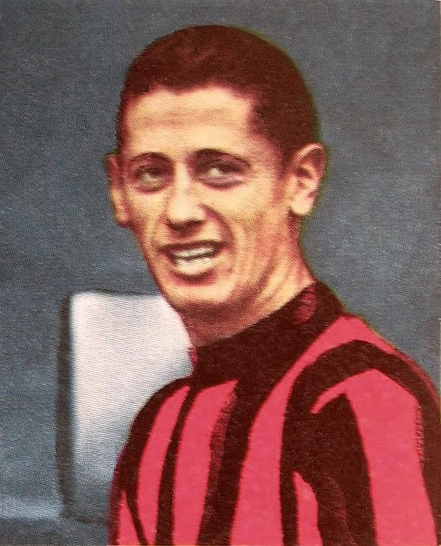 Juan Alberto Schiaffino en 1959 (AC Milan) - FIGURINA PANINI CAMPIONATO 1970/71.